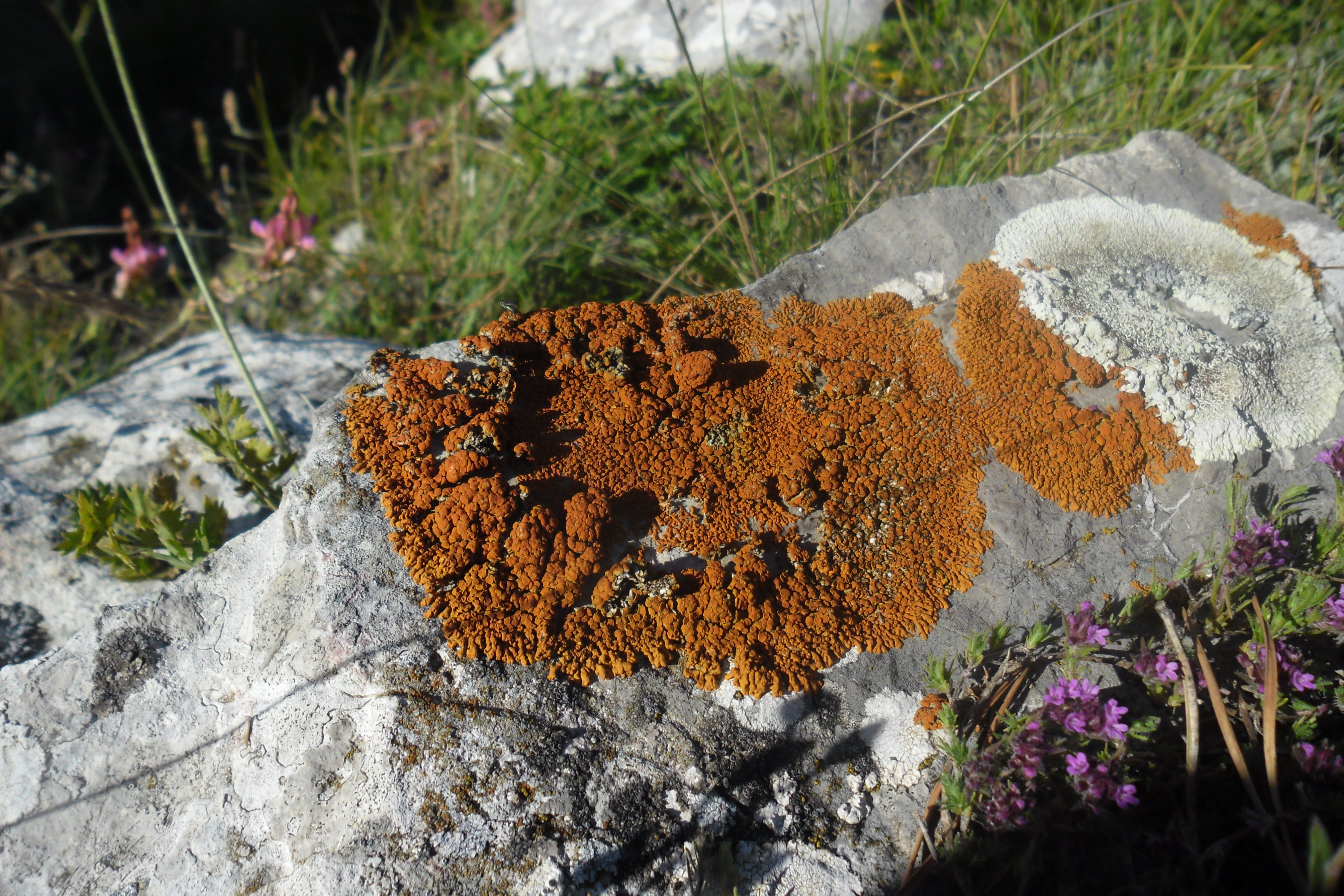 Фото